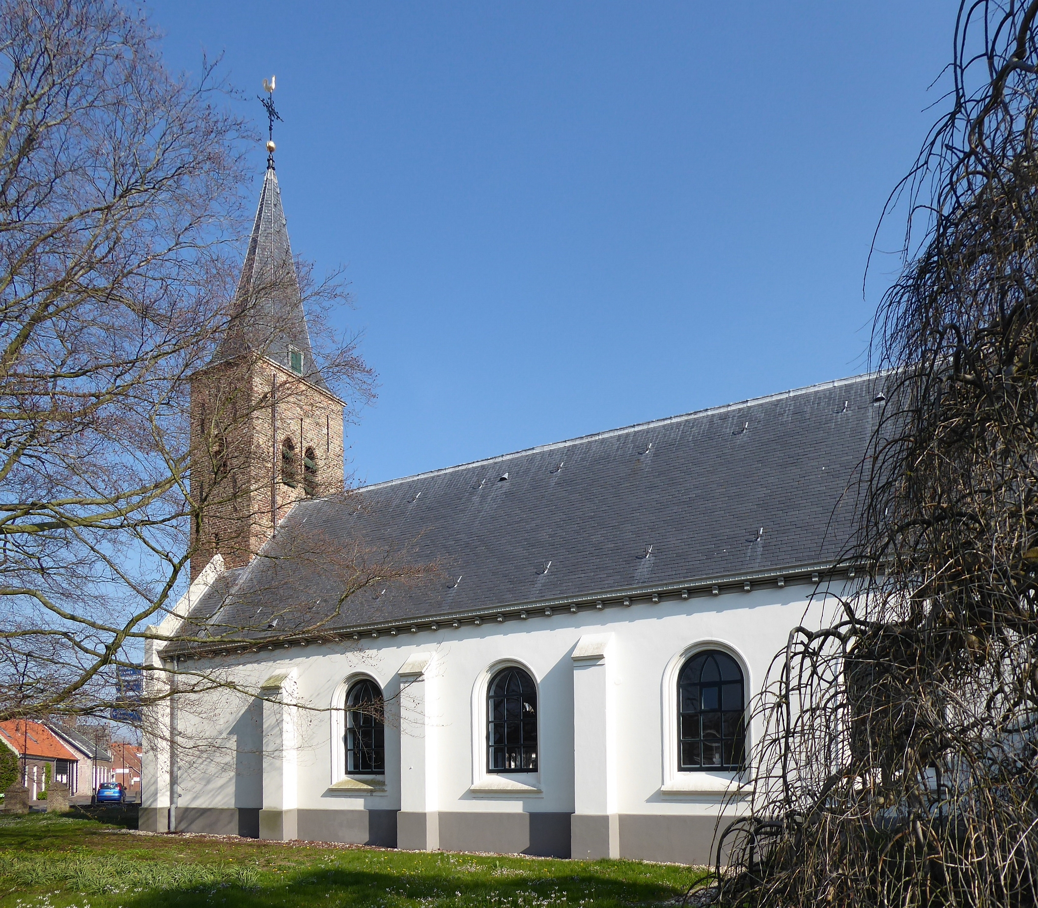 Sint Petrus en Pauluskerk (Ovezande)